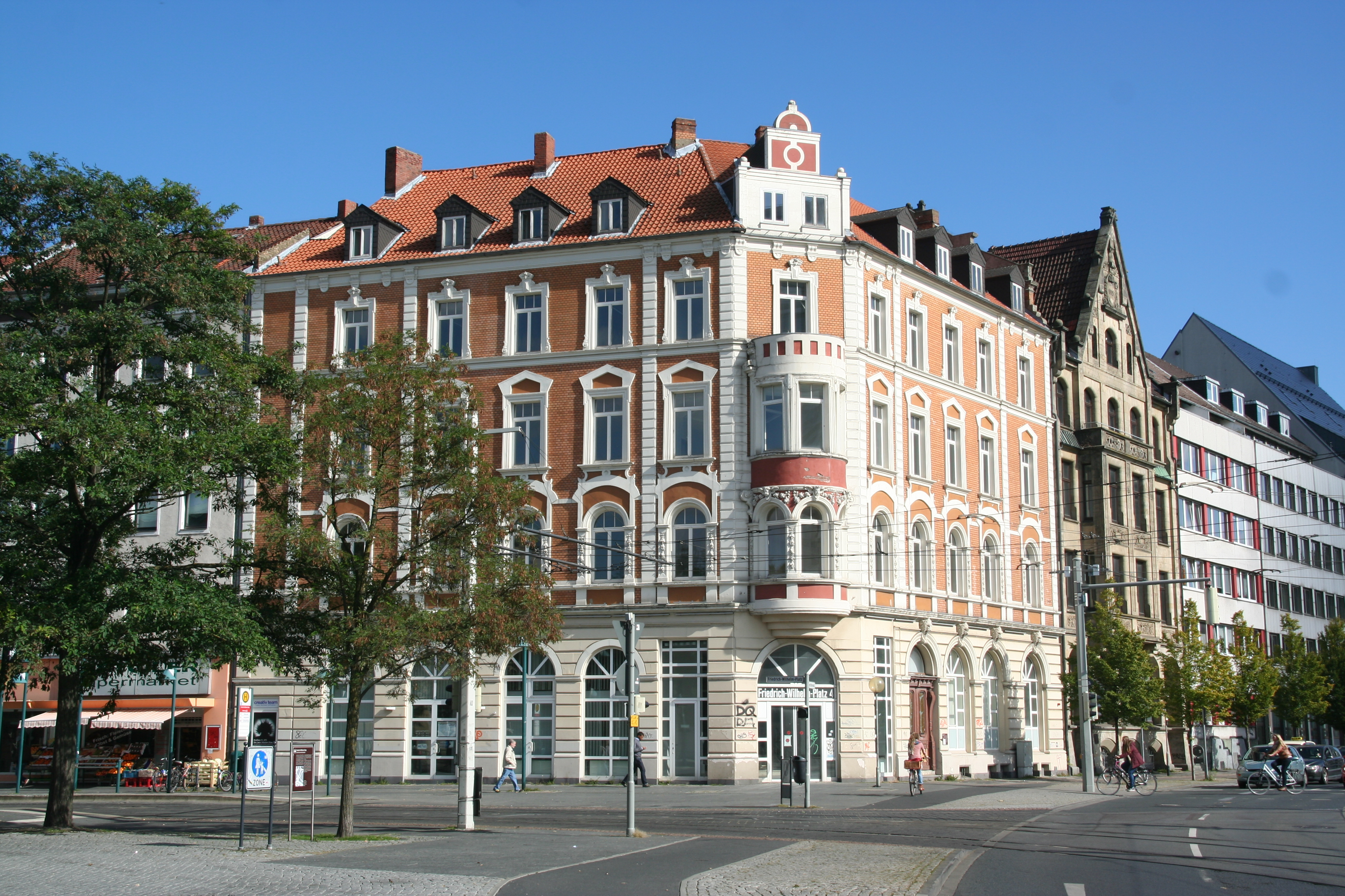 Braunschweiger Altstadt, ehemaliges Hotel Monopol am alten Bahnhof, Bruchtorwall 1, im September 2015. Erbaut 1889. Bau des Braunschweiger Architekturprofessors Constantin Uhde